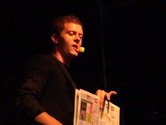 Det här är en bild av den svenska tv-personligheten Tobbe Trollkarl. BIlden togs under ett uppträdande i Sundbyberg.